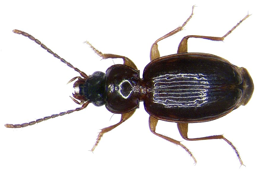 Familie: Carabidae Groesse: 3,3-4 mm Verbreitung: Mittelgebirge in Mitteleuropa, Westkarpaten, Tatra, Ostalpen Fundort: Germania, Bayern, Oberfranken, Naila/Lippertsgrün leg.det. U.Schmidt, 2006 Photo: U.Schmidt, 2006